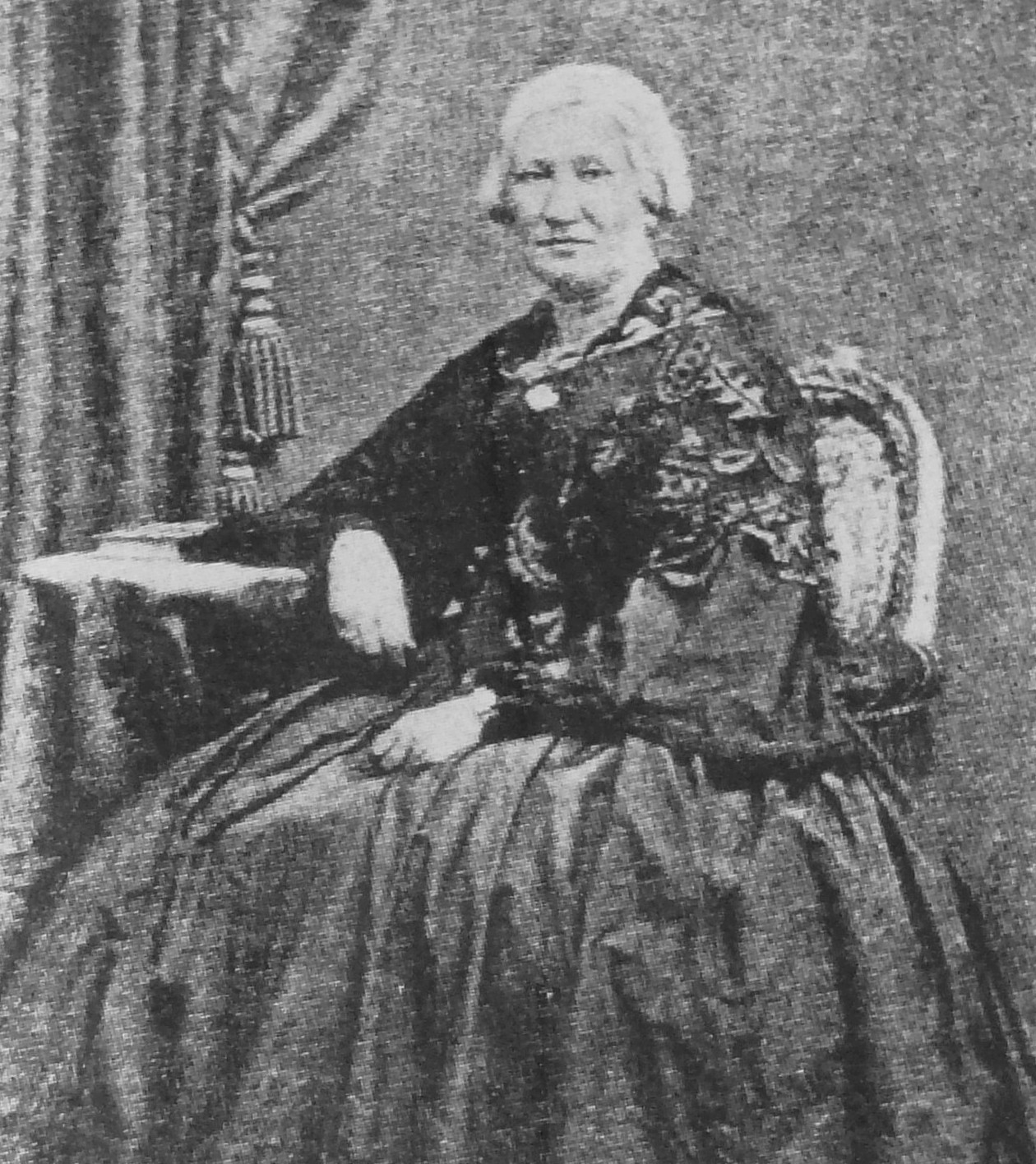 Wilhelmina af Tibell